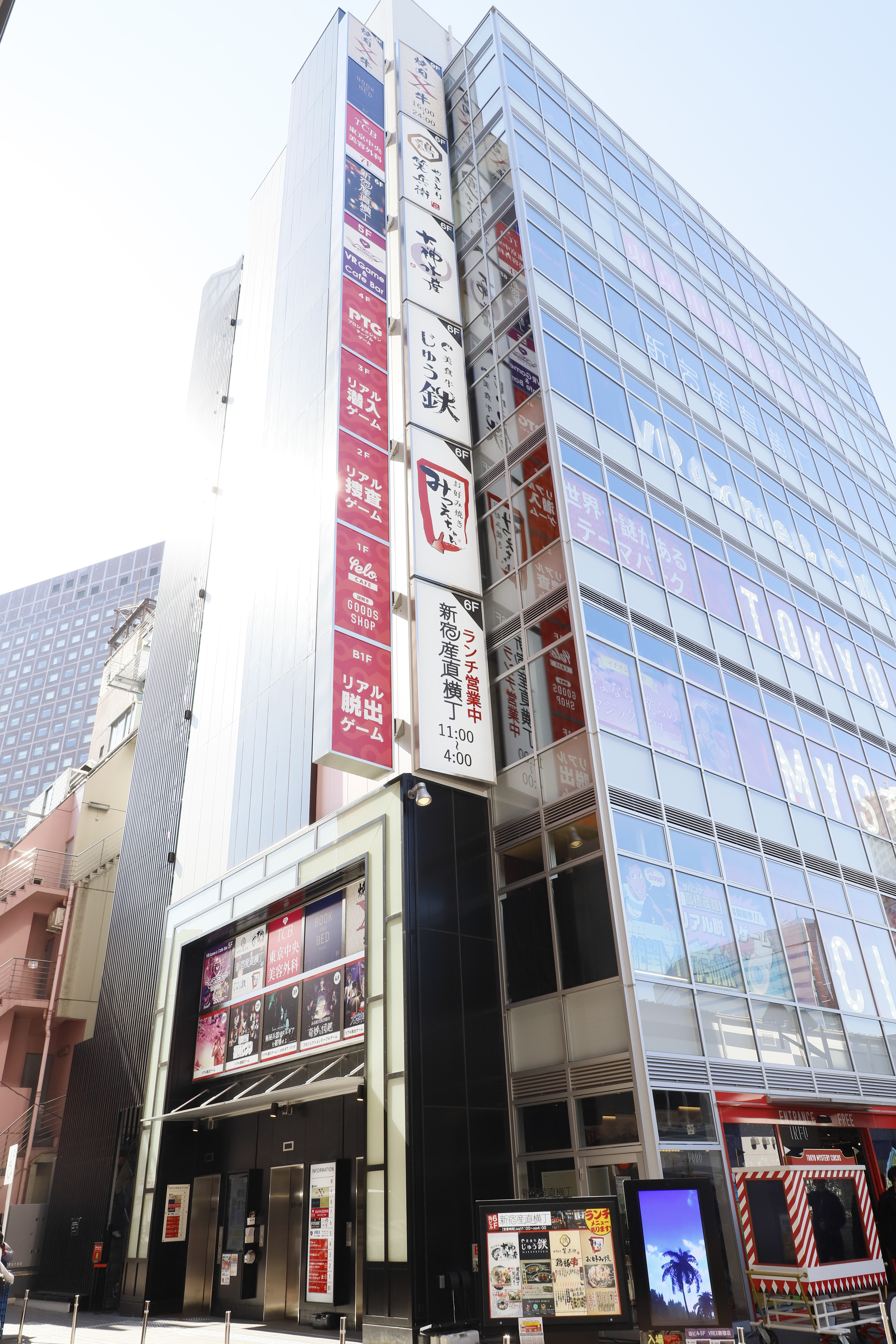 歌舞伎町APMビルの外観（2019年2月撮影）。